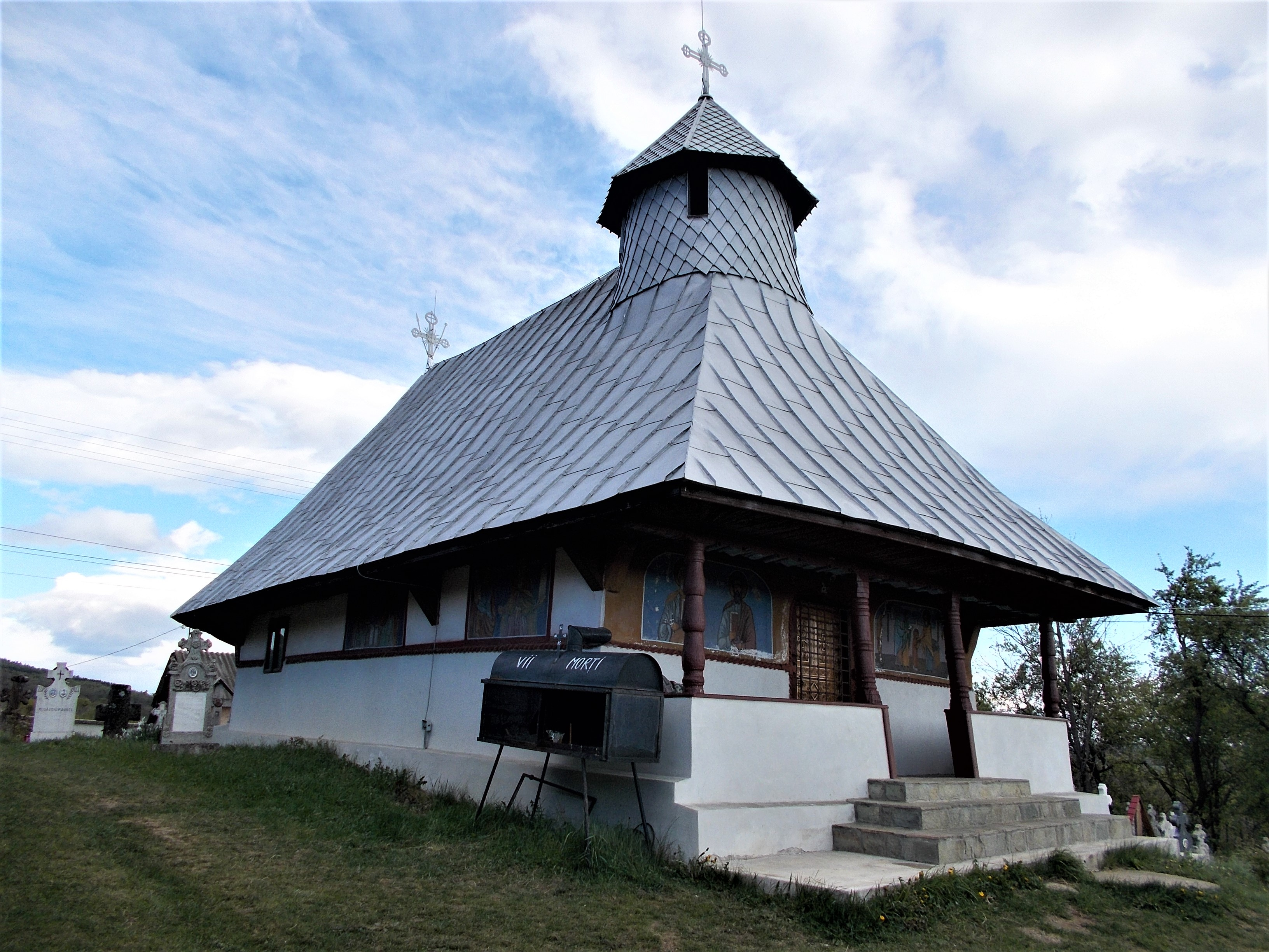 Biserica de lemn „Intrarea în Biserică a Maicii Domnului” din Bercești, cătun Măgura, județul Gorj